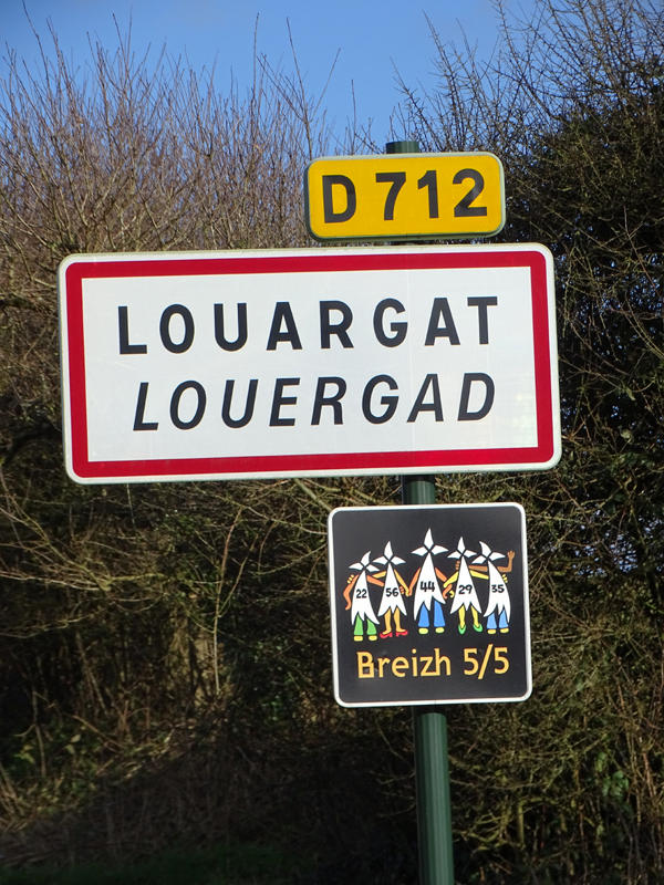 Louergad. Panne-hent